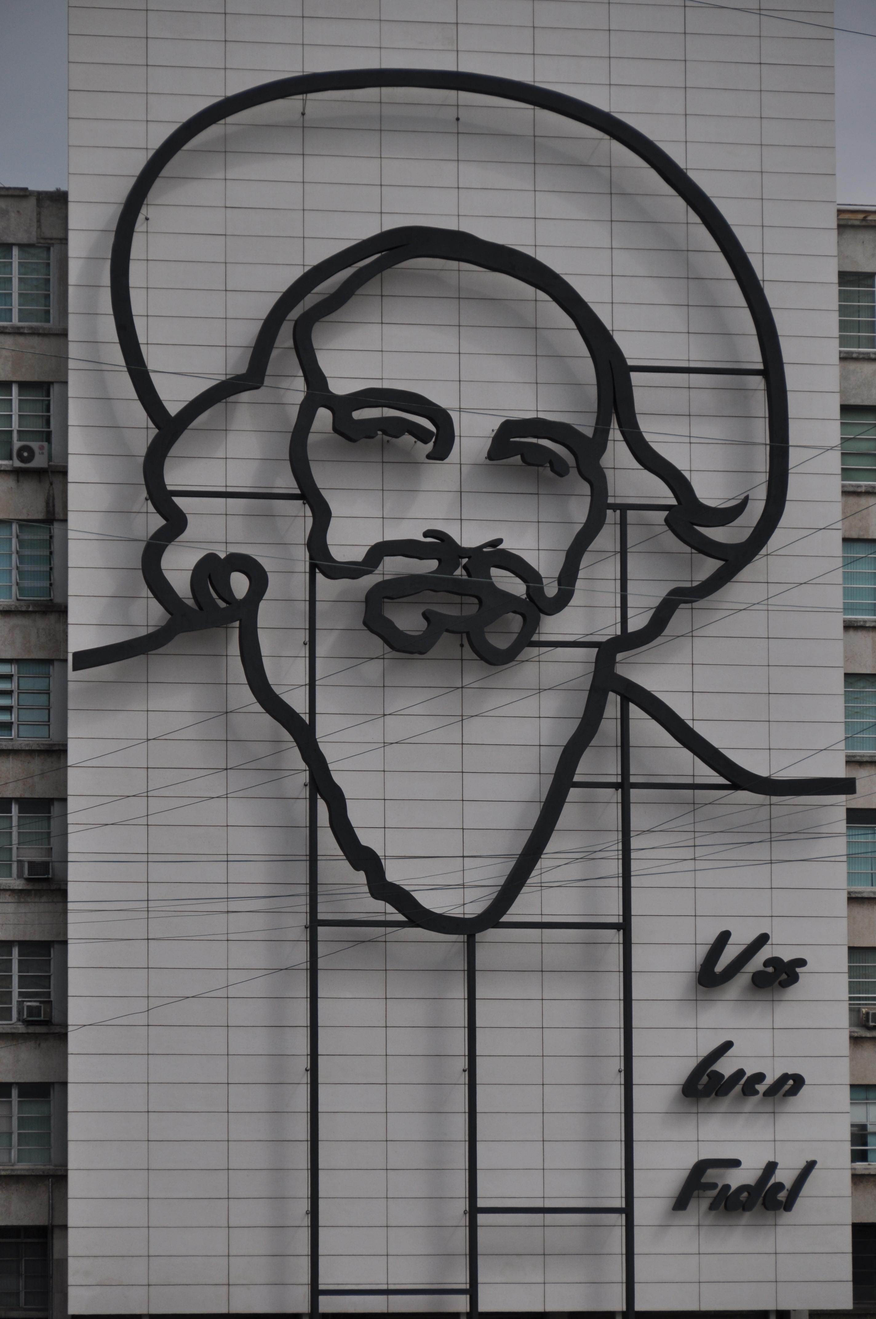 Camilo Cienfuegos an der Fassade des Informationsministeriums in Havanna